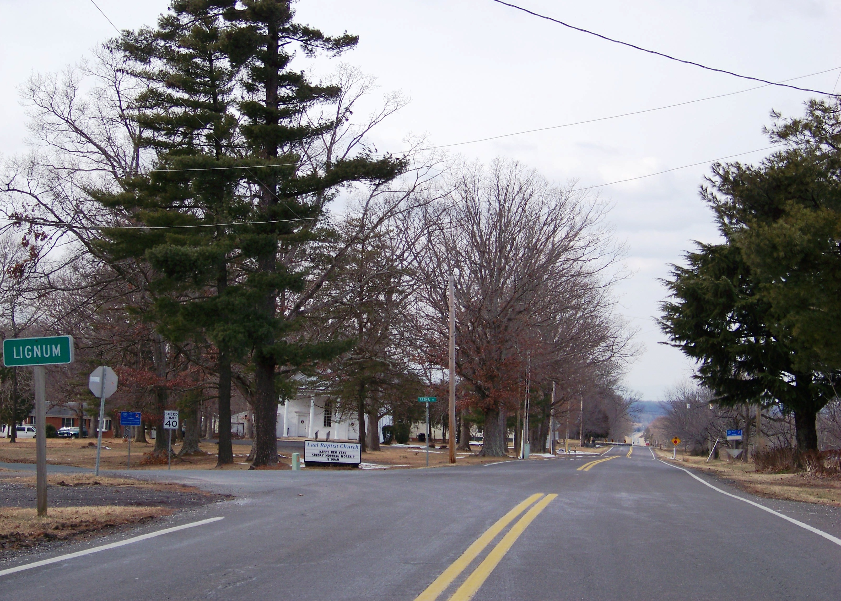 Lignum, Virginia